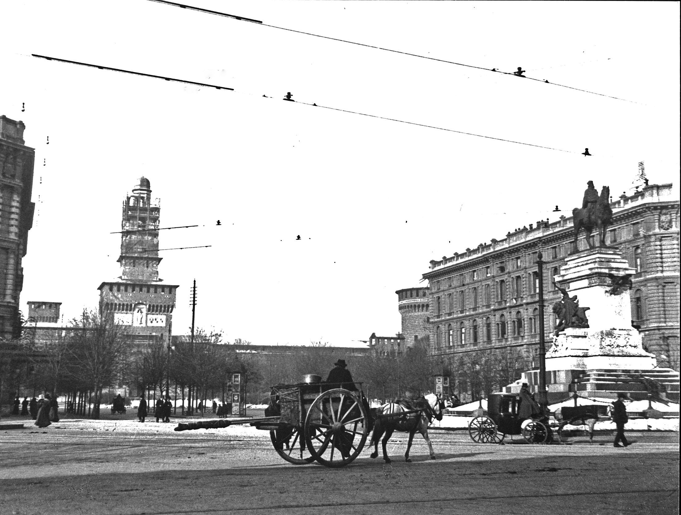 La Torre del Filarete ancora in costruzione (circa 1905).